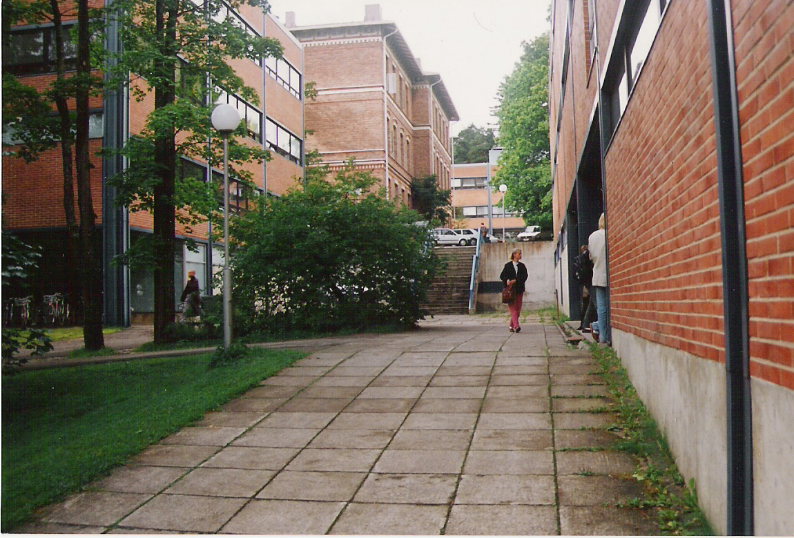 Jyväskylän Yliopiston Seminaarinmäki